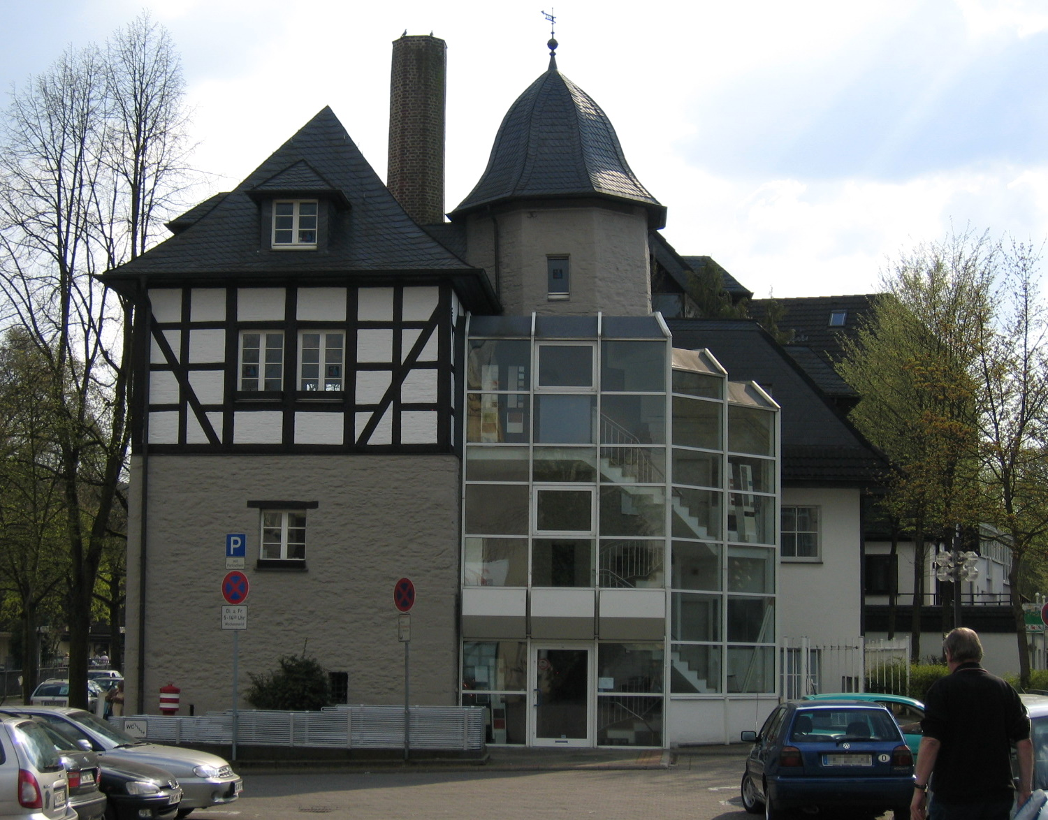 Description: Unter Denkmalschutz stehender Rentschreiberturm (Rest des von Erzbischof Walram von Köln ab 1344 erbauten kurfürstlichen Schlosses Menden [abgebrochen 1979]) mit achteckigem Treppenturm aus dem 16. Jahrhundert in Menden (Sauerland). Source: selbst fotografiert Date: 25. Apr. 2006 Author: Asio otus